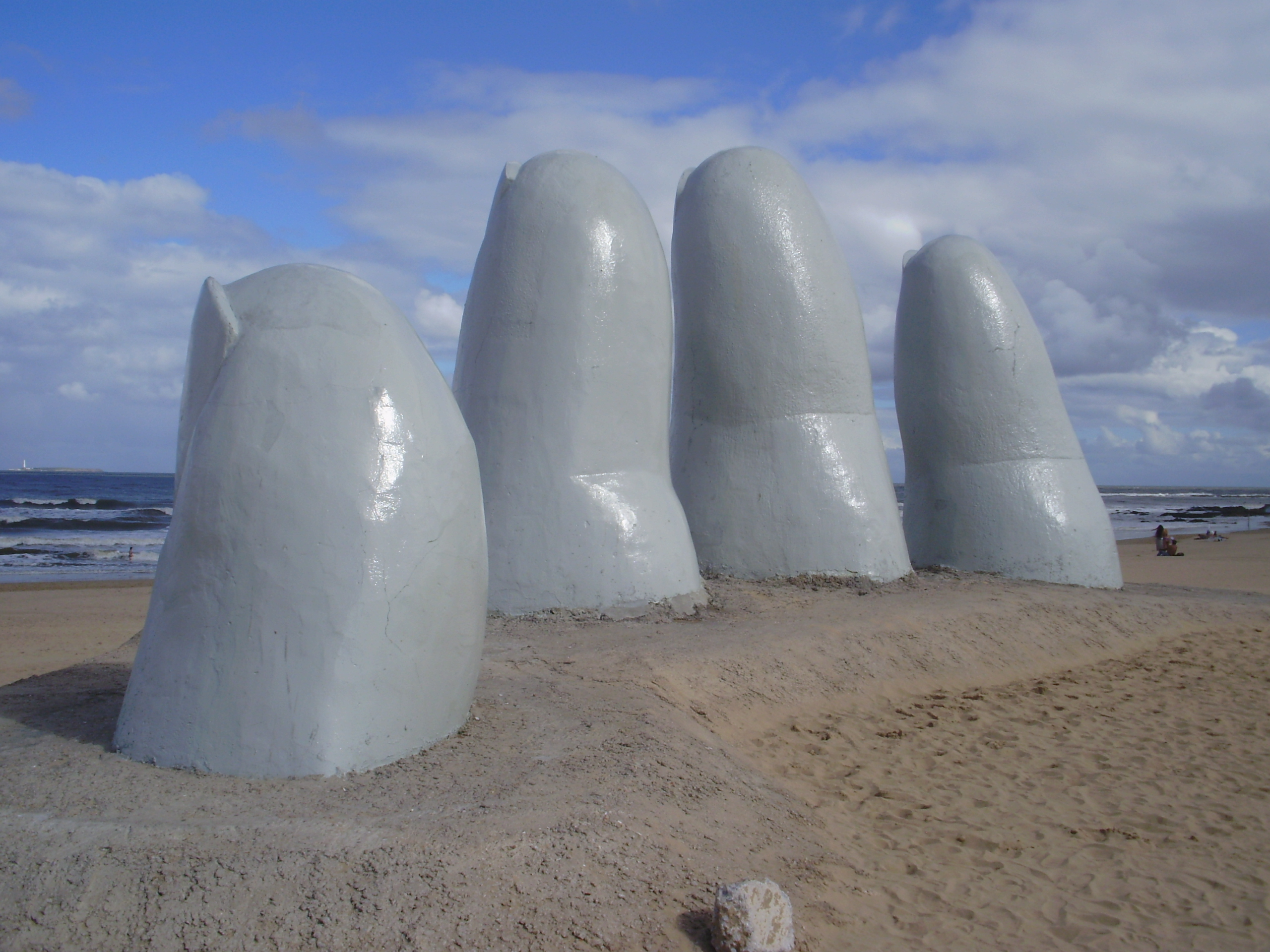 Escultura Hombre emergiendo a la vida o Monumento al ahogado, también conocida como La mano, en Punta del Este (Uruguay).